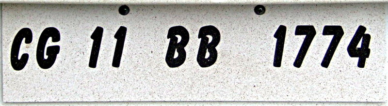 targa dello stato indiano del Chhattisgarh